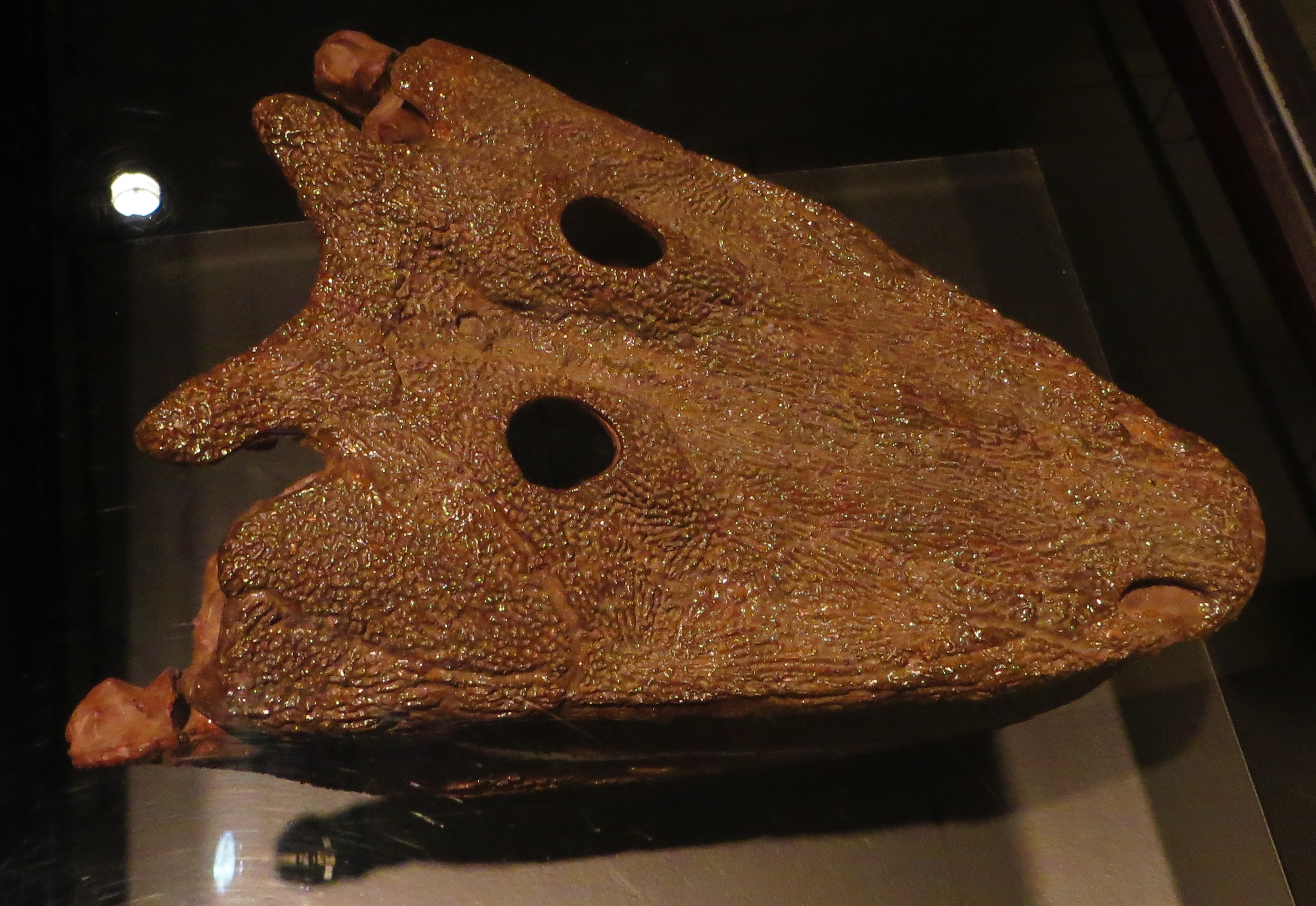 Fossil of Parotosuchus, an extinct amphibian- Took the picture at Dinosaurium, Prague